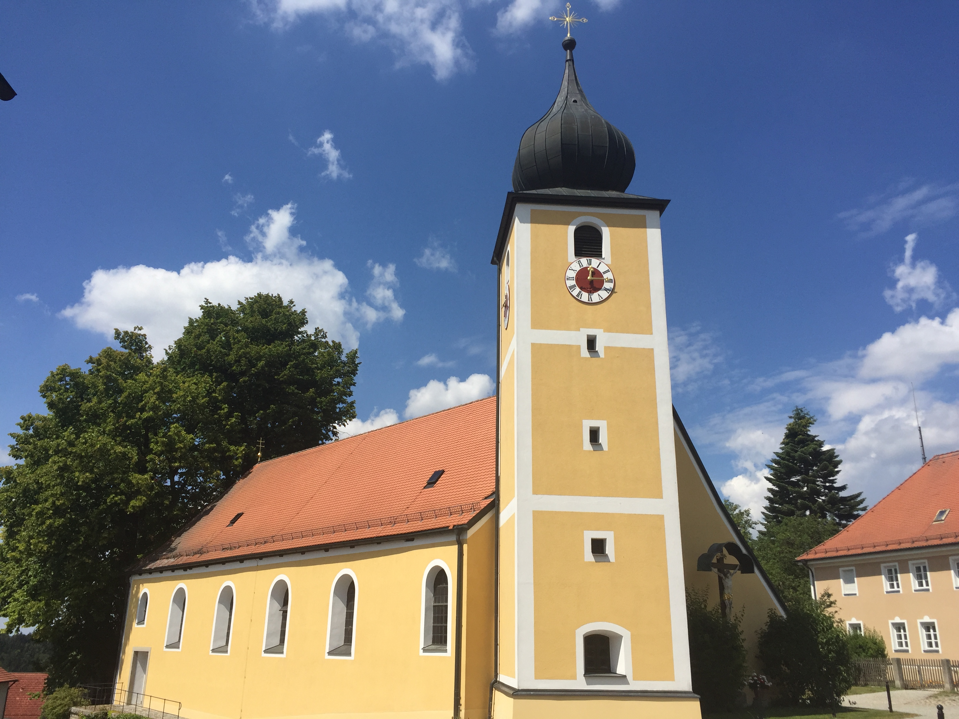 Kirche St. Christoph